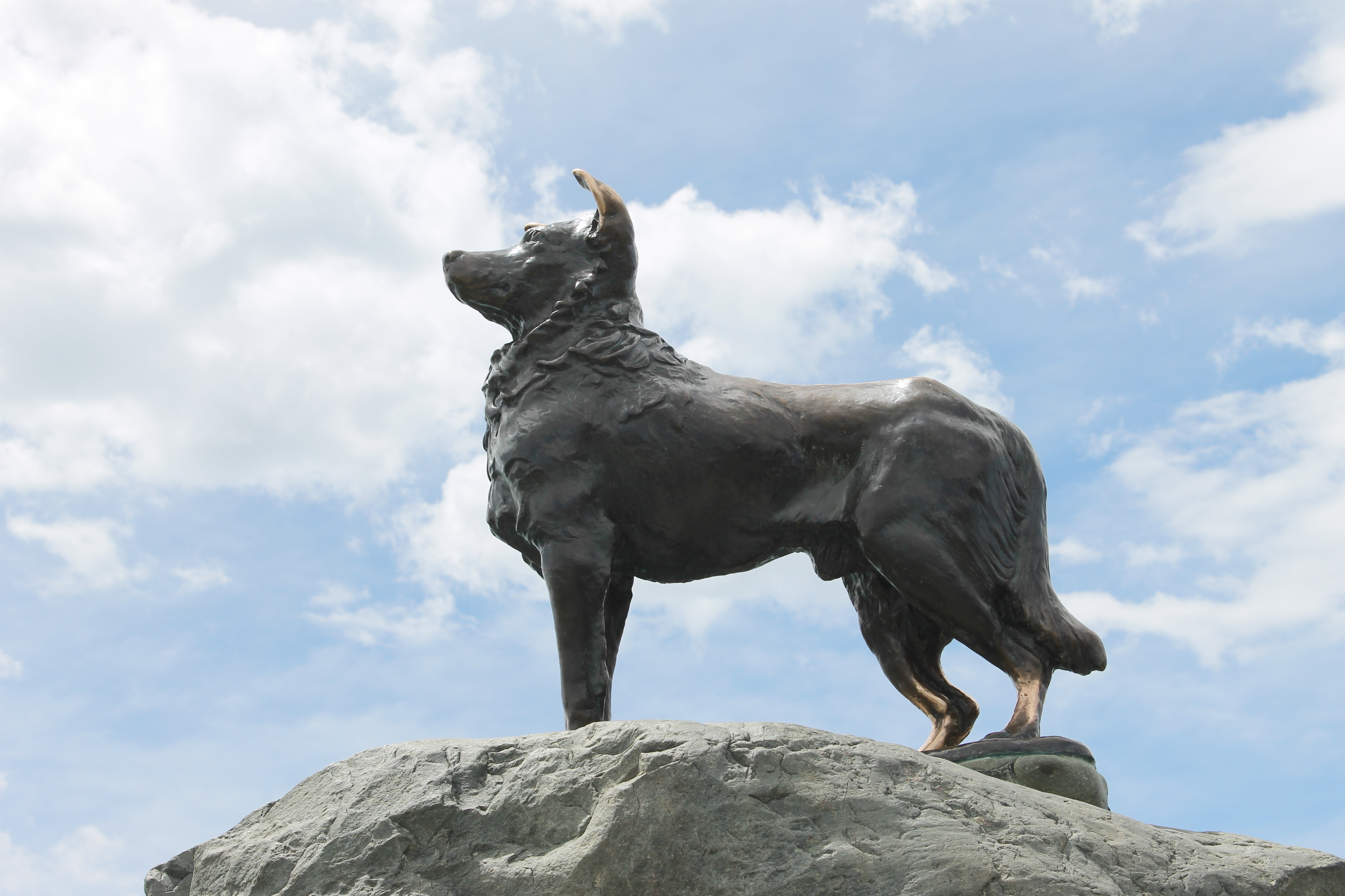 Statue eines (Boder-)Collie-Hütehundes